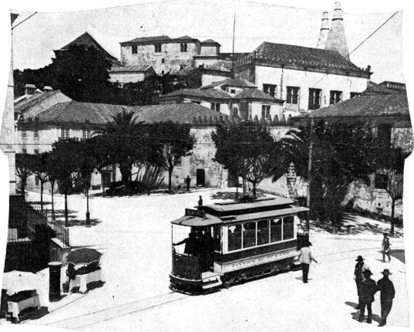 Elétrico da Companhia Cintra-ao-Oceano na “Vila Velha” de Sintra, fazendo o seu término na praça junto ao palácio.